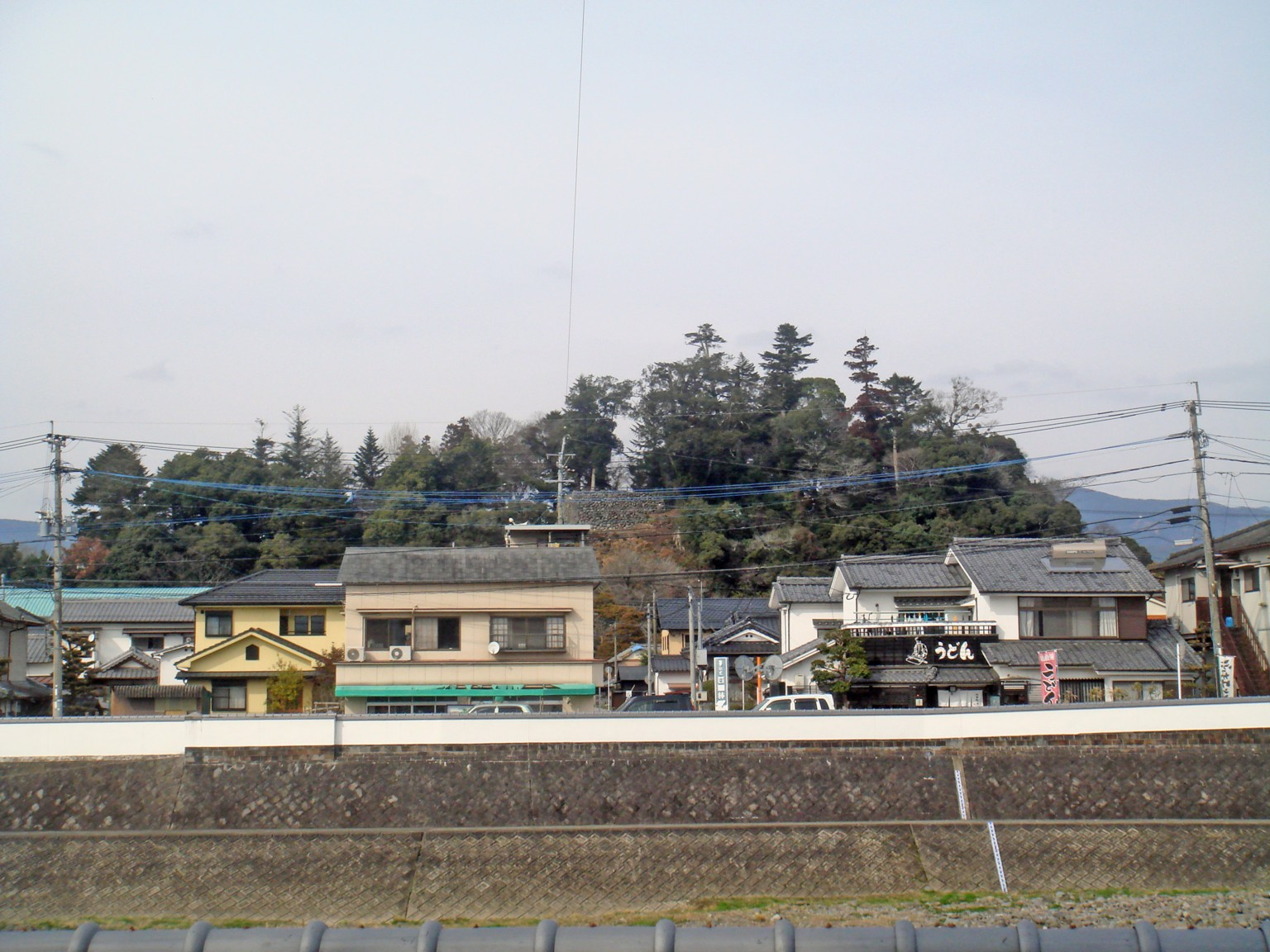 大分県日田市丸山町にある月隈山、月隈公園の遠景。豆田八坂神社から花月川対岸を望んだ。